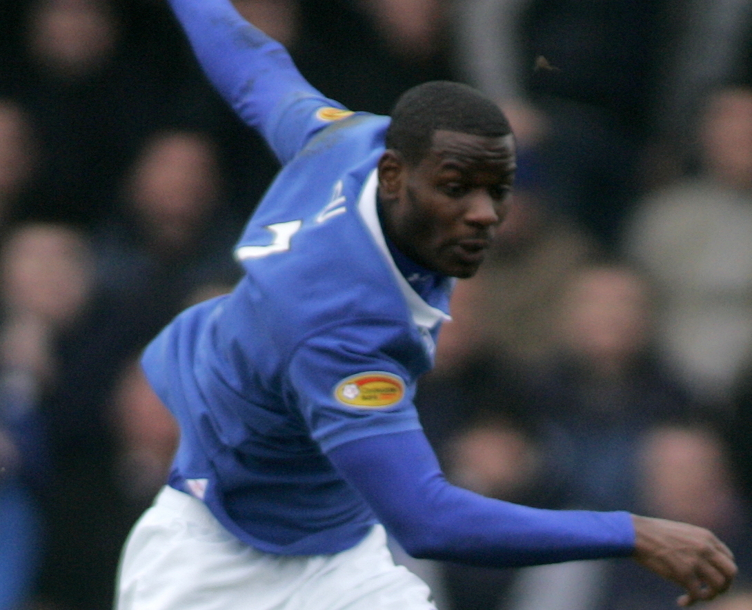 Edu Chance